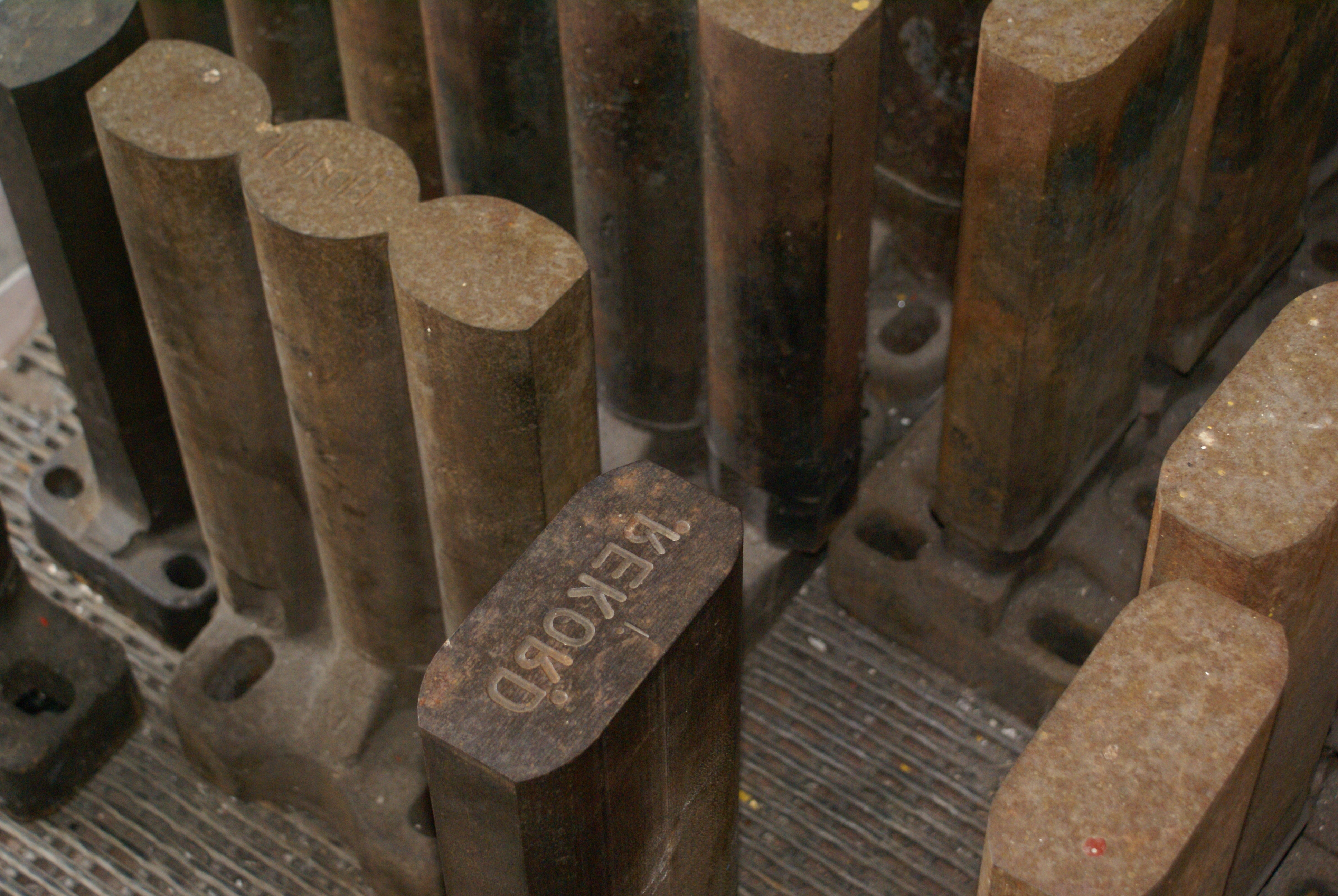 Formstempel für Kohlebriketts Mit diesen Stempeln wurde die Brikettierkohle in die Presskanäle und somit in Brikettform gepresst. Energiefabrik Knappenrode in Hoyerswerda-Knappenrode